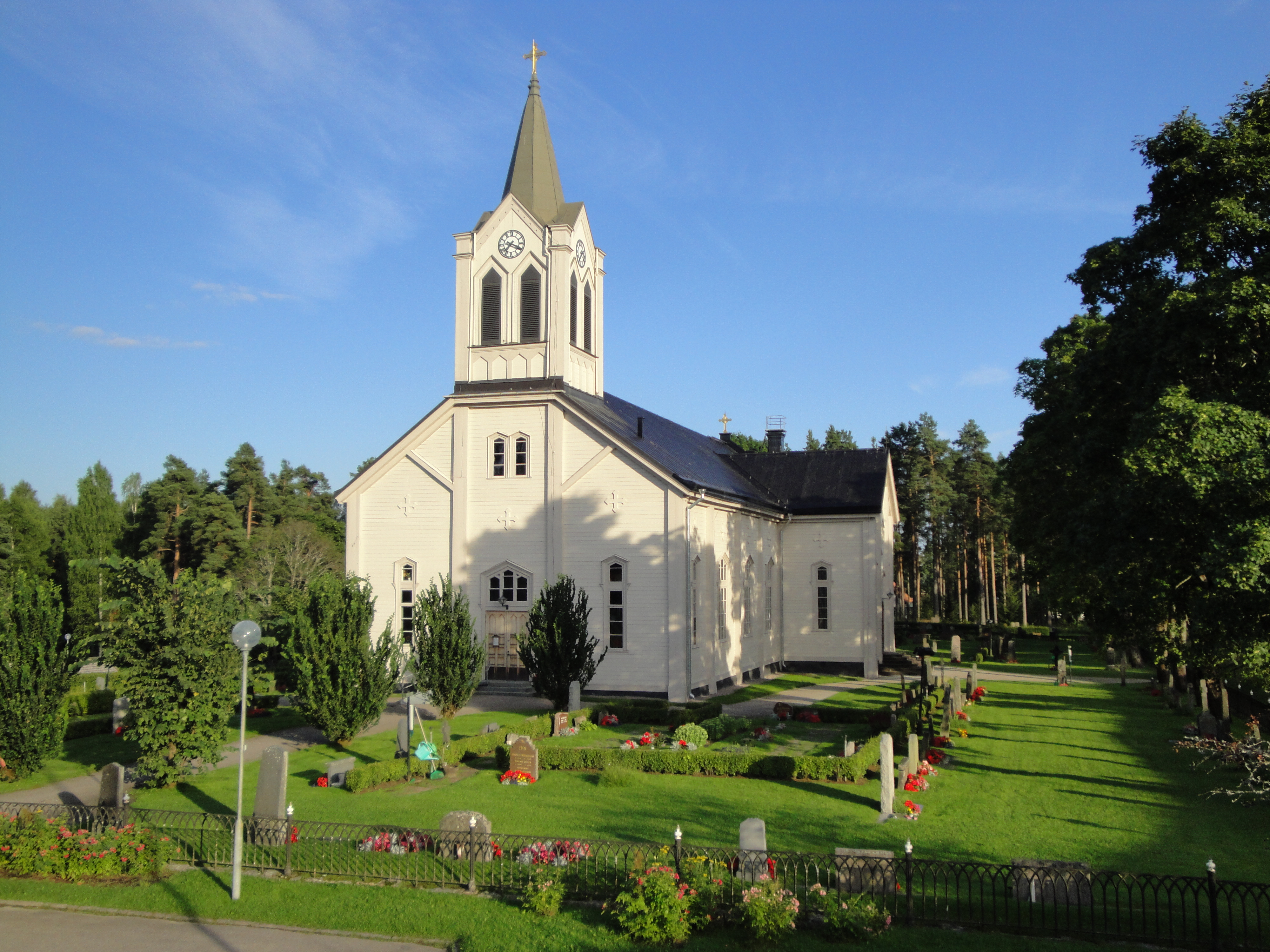 Järbo kyrka, Sandvikens kommun.